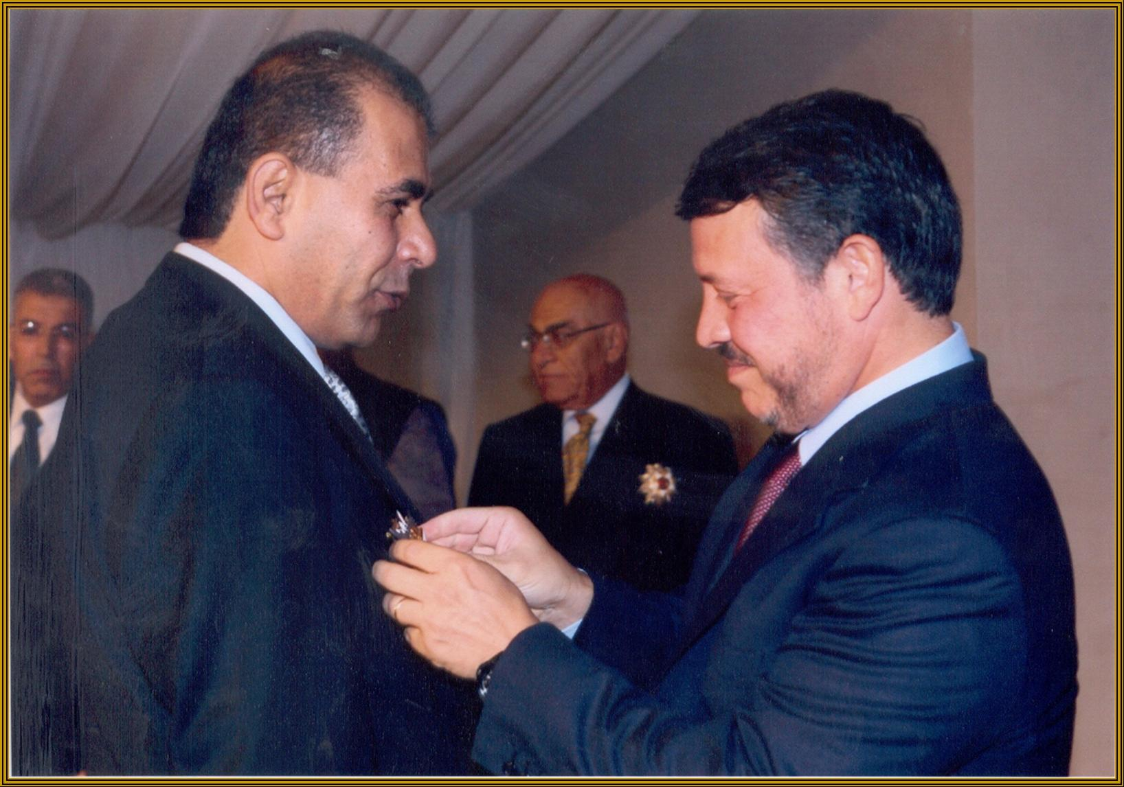 جلالة الملك عبدالله الثاني يقلد الدكتور نضال الزعبي وسام الاستقلال تقديراً لجهوده الجليلة في مجال البحوث النووية